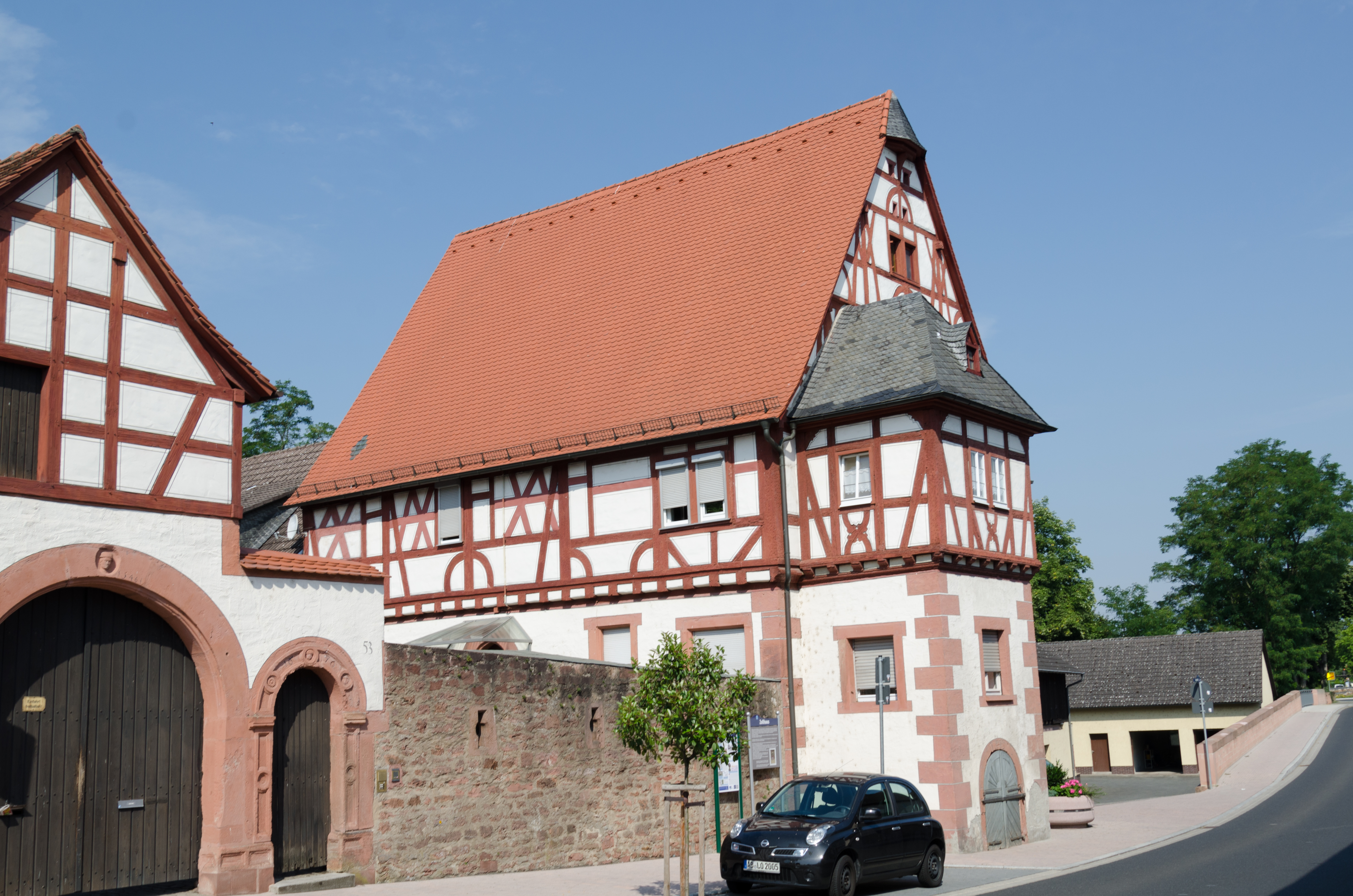 Hauptstraße 53 in Stockstadt am Main